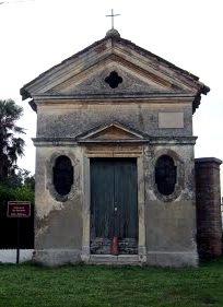 L'Oratorio di San Benedetto è databile presumibilmente tra il XVII e il XVIII secolo. La chiesa è ricordata nelle visite vescovili dal 1780 al 1823. Al suo interno, le statue di Benedetto da Norcia e dei putti ai suoi lati sono di Giovanni Maria Morlaiter, realizzate intorno la 1750.